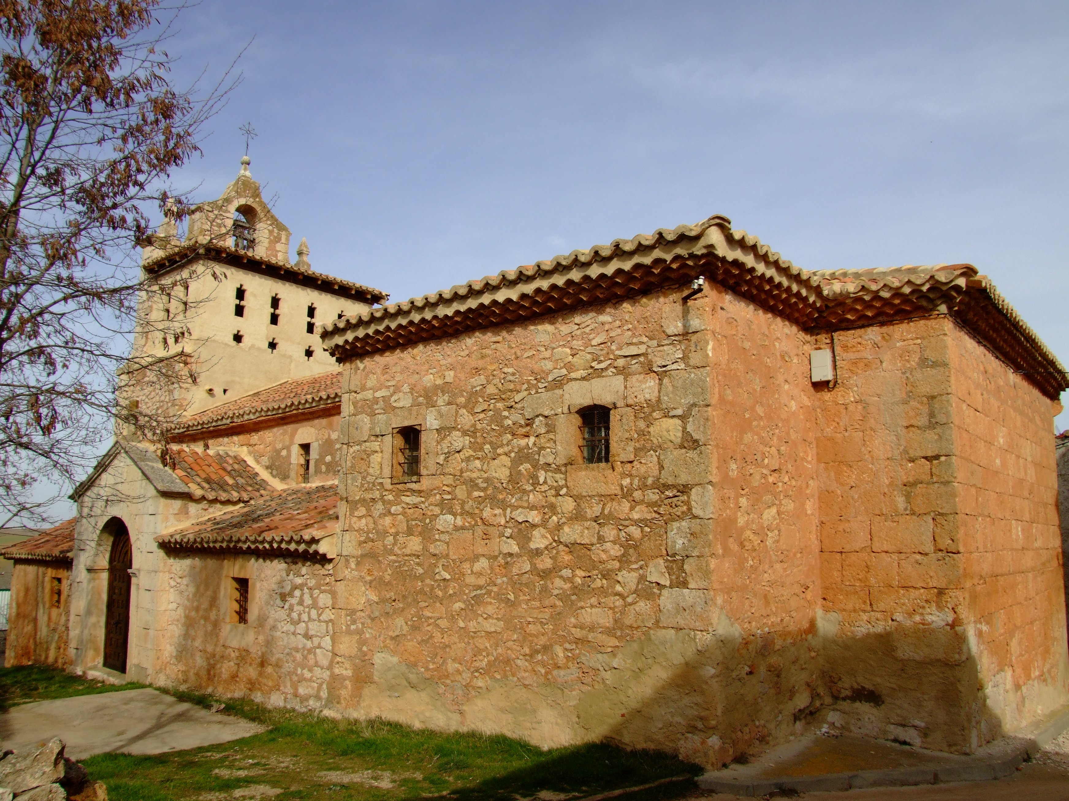 Foto de la Iglesia de Santa María Magdalena de Torraño (España)